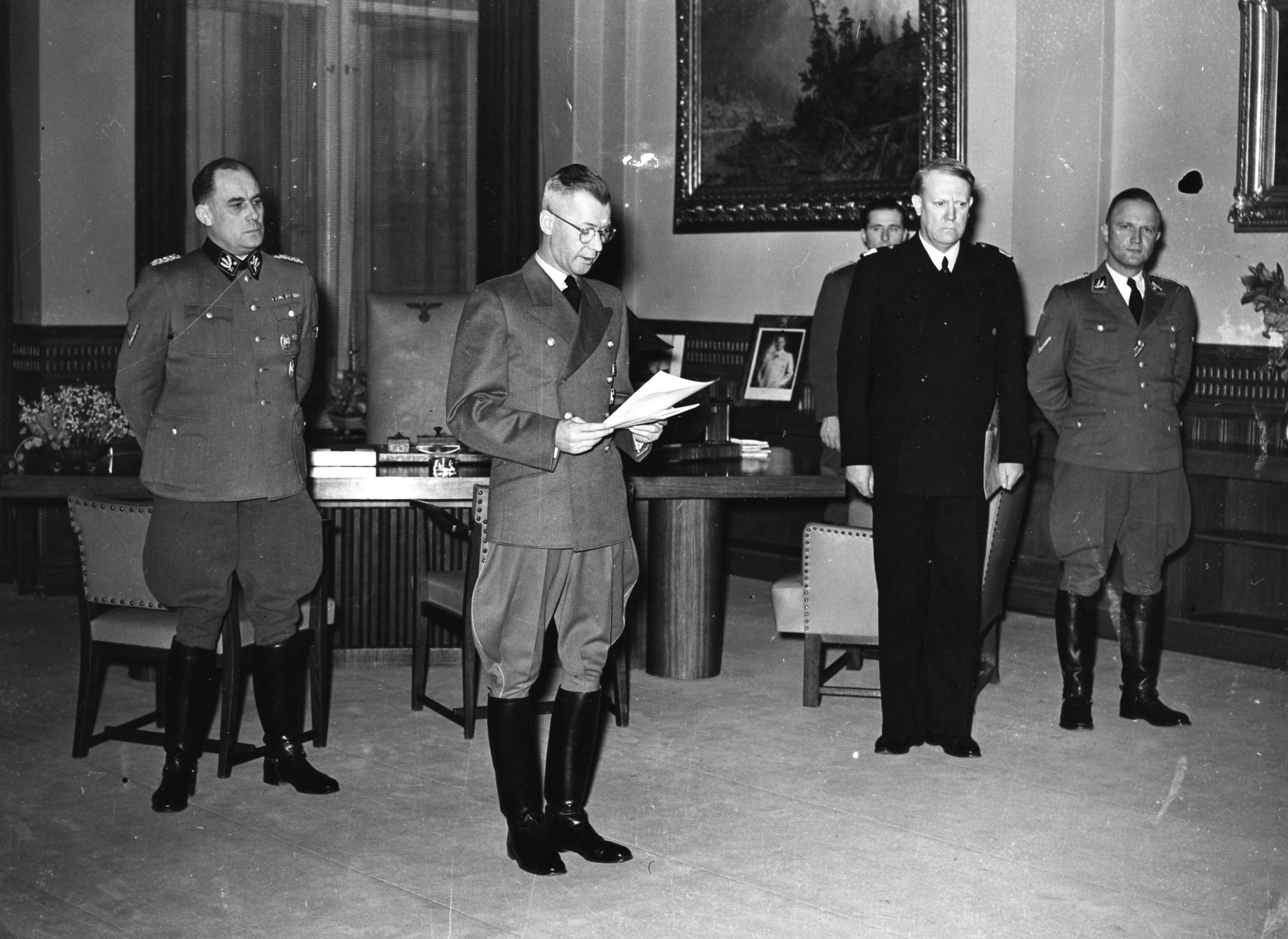 T. v. Wilhelm Rediess, Josef Terboven, Vidkun Quisling. 1942/02/01. RA/PA-1209/Ue 94/ img048 «Statsakten» var en seremoni på Akershus slott i Oslo under andre verdenskrig 1. februar 1942 da rikskommissar Josef Terboven innsatte Vidkun Quisling, leder for Nasjonal Samling (NS), som «ministerpresident» i Norge, og de tyskkontrollerte kommissariske ministerne ble erstattet av «den nasjonale regjering» utgått fra NS. «Statsakten» markerte at Quisling fikk den formelle makta i Norge, og ved lov av 12. mars 1942 ble NS «statsbærende parti». Quisling hadde håp om at ordninga også skulle gi NS reell makt og føre til fred mellom Norge og Tyskland, men tysk tilsynsforvaltninga gjennom Reichskommissariat Norwegen fortsatte som før inntil frigjøringa 8. mai 1945.